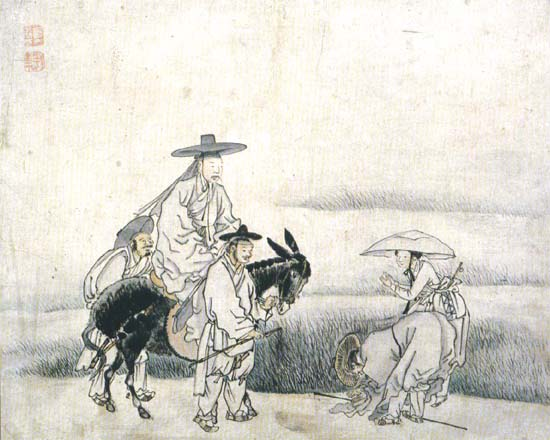 Dat Bild Eddelmann un Buur von'n koreaanschen Maler Kim Duk-sin